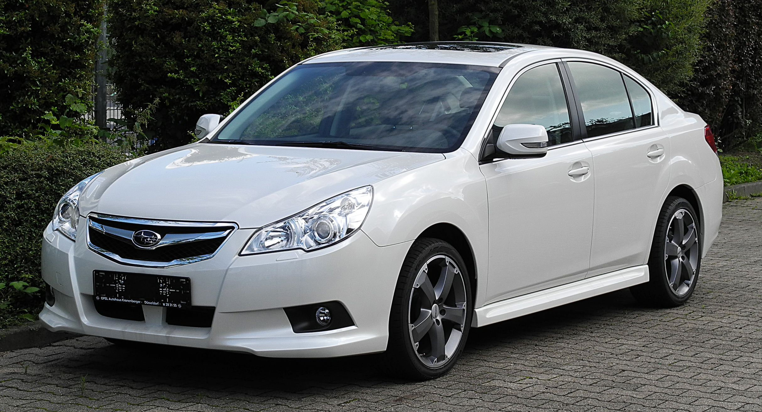 Subaru Legacy 2.0i Comfort (V)